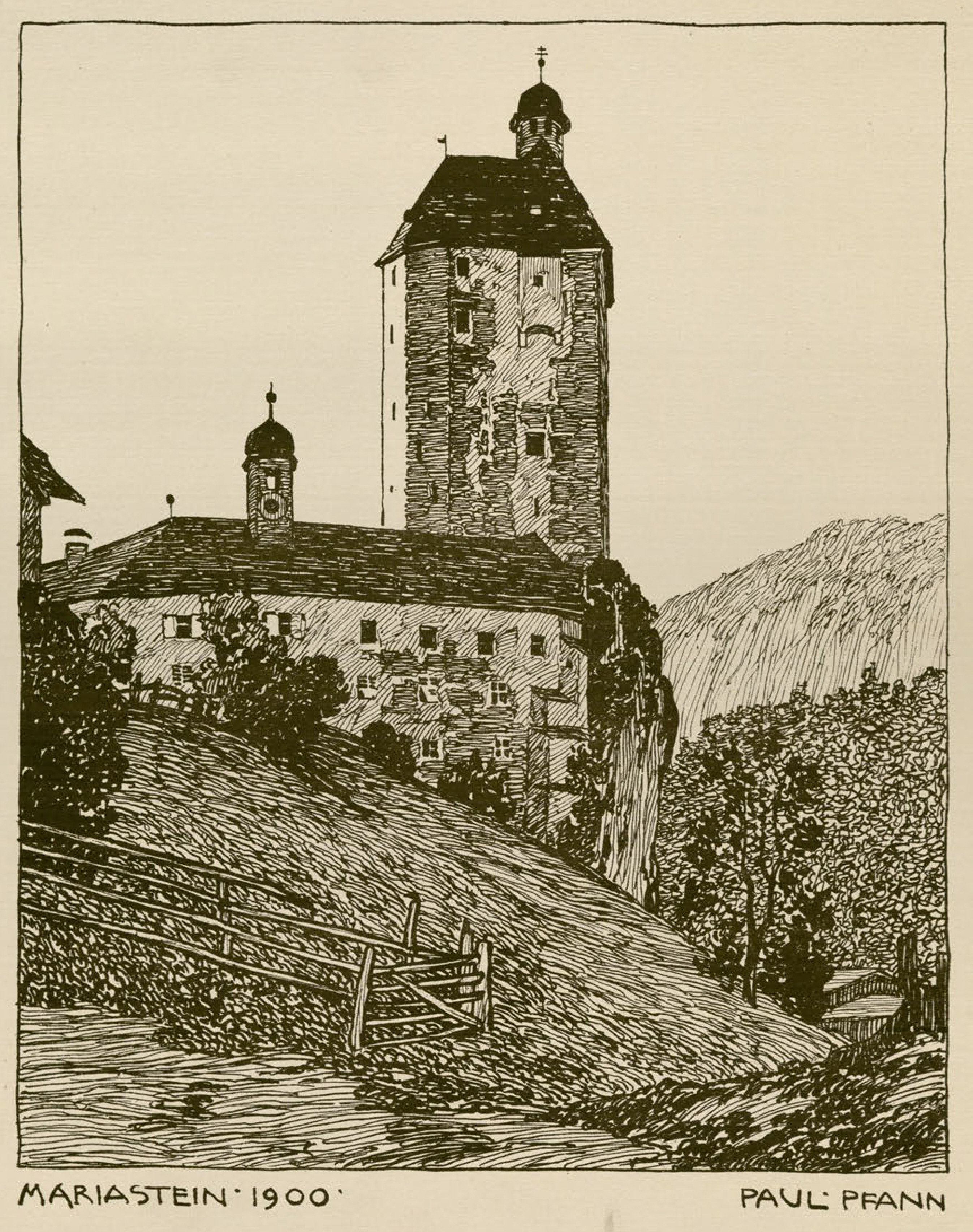 Mariastein, 1900. Blatt aus: "Bilder aus Tyrol", München 1909.